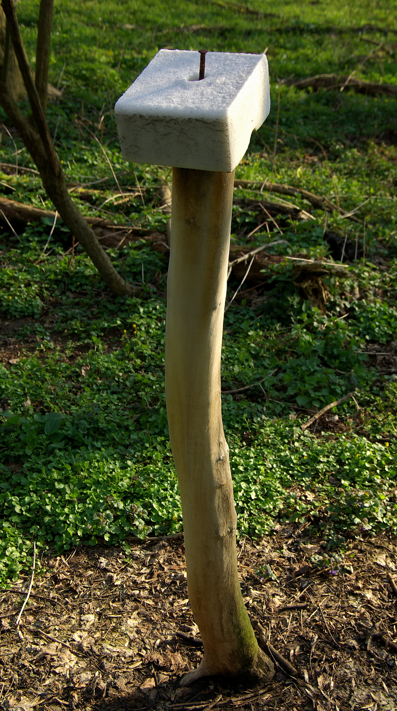 Leckstein auf Wildäsung